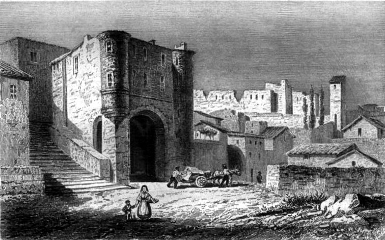 Image en provenance du livre : Eusèbe Girault de Saint-Fargeau, Guide pittoresque du voyageur en France, contenant la statistique et la description complète des quatre-vingt-six départements, orné de 740 vignettes et portraits gravés sur acier, de quatre-vingt-six cartes de départements et d'une grande carte routière de la France, par une Société de gens de lettres, de géographes et d'artistes, Paris, F. Didot frères, 1838, 6 volumes in-8° (BNF : 8-L25- 46). Volume III Didot frères, 1838. Route de Paris à Nice traversant les départements de l'Isère, des Hautes-Alpes, des Basses-Alpes et du Var. auteurs dessins : Rauch (ou autre) auteurs gravures : Skelton fils, Schroeder, Bishop (ou autre)